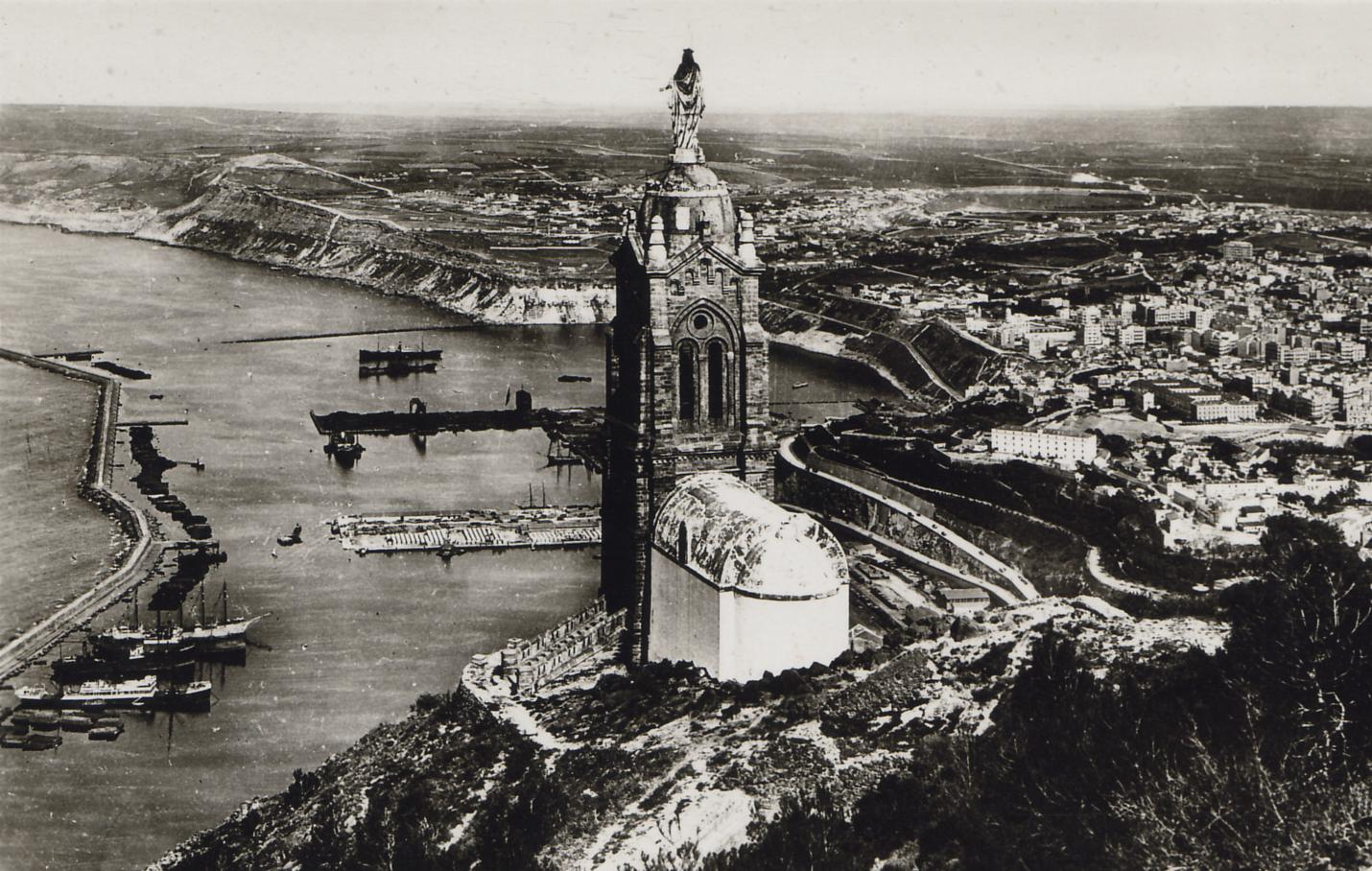 Oran, Algérie, vers 1910. Chapelle Notre-Dame du Salut à Santa-Cruz, et en fond, la ville et le port d'Oran.